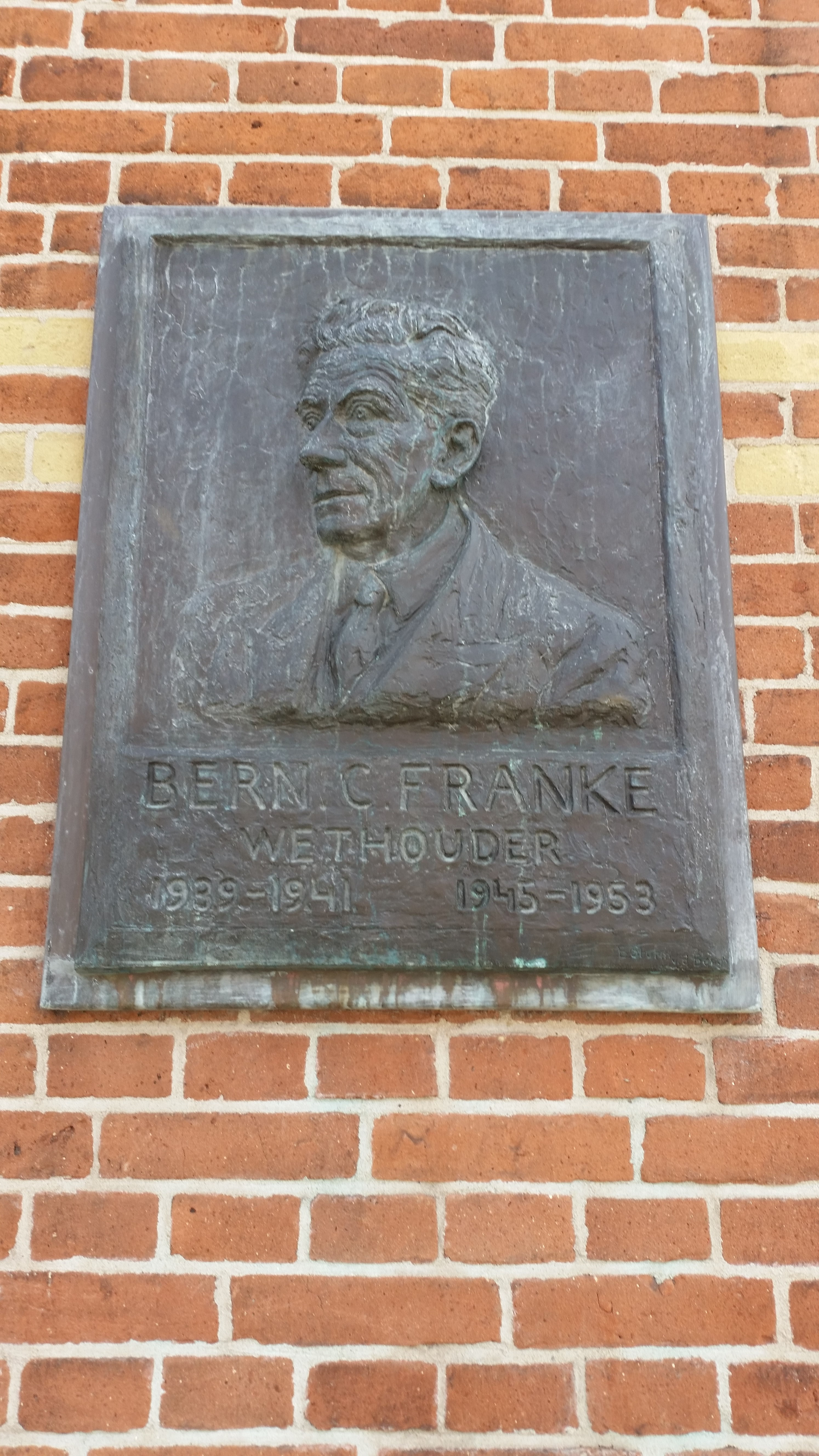 Plaquette Bernard Franke door Bep Sturm-van den Bergh aan de Wethouder Frankestraat, Amsterdam, Watergraafsmeer